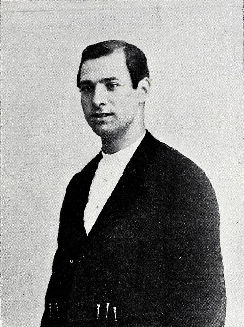 Último retrato de Dominguín.